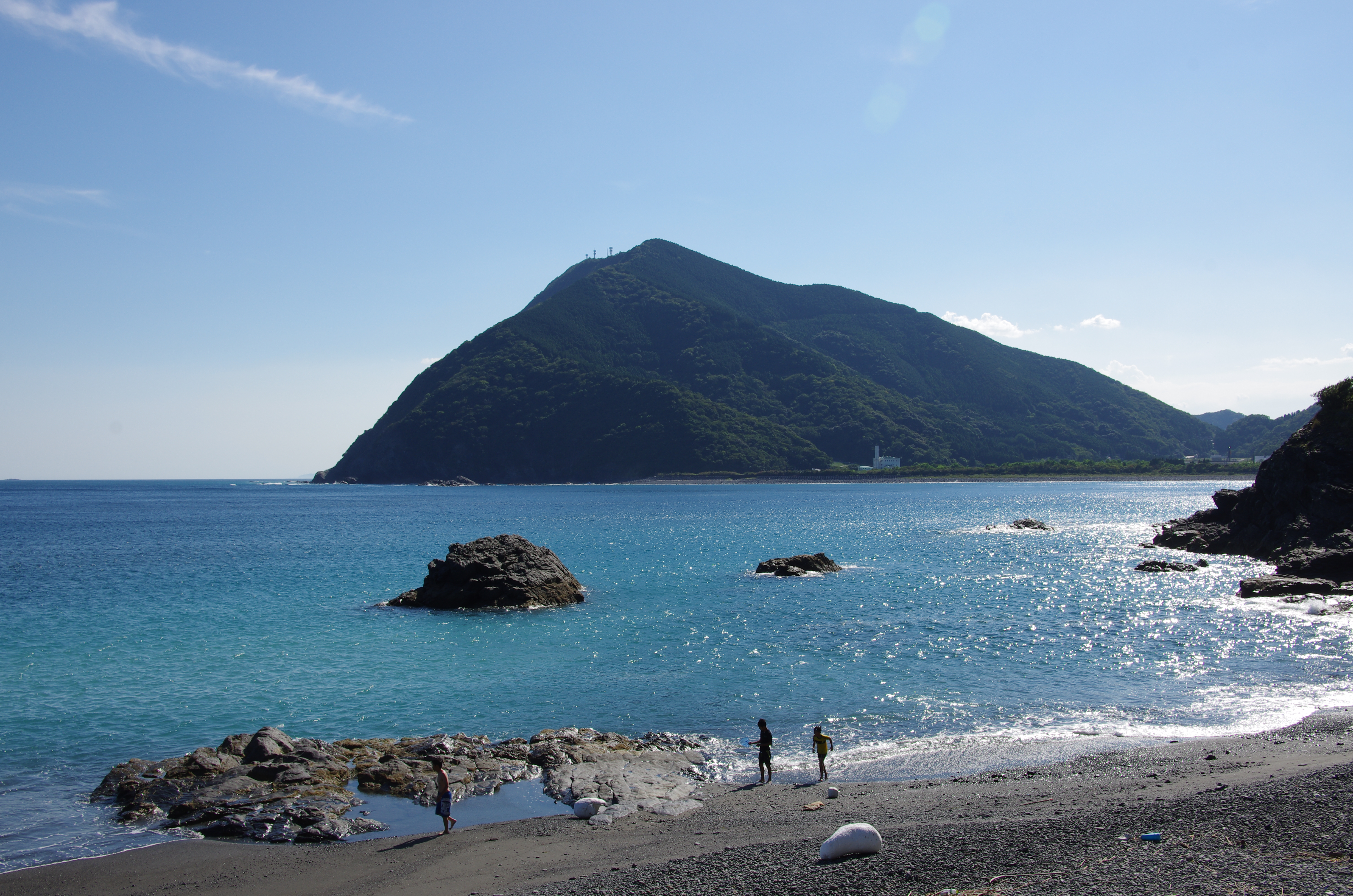 渚百選の元猿海岸